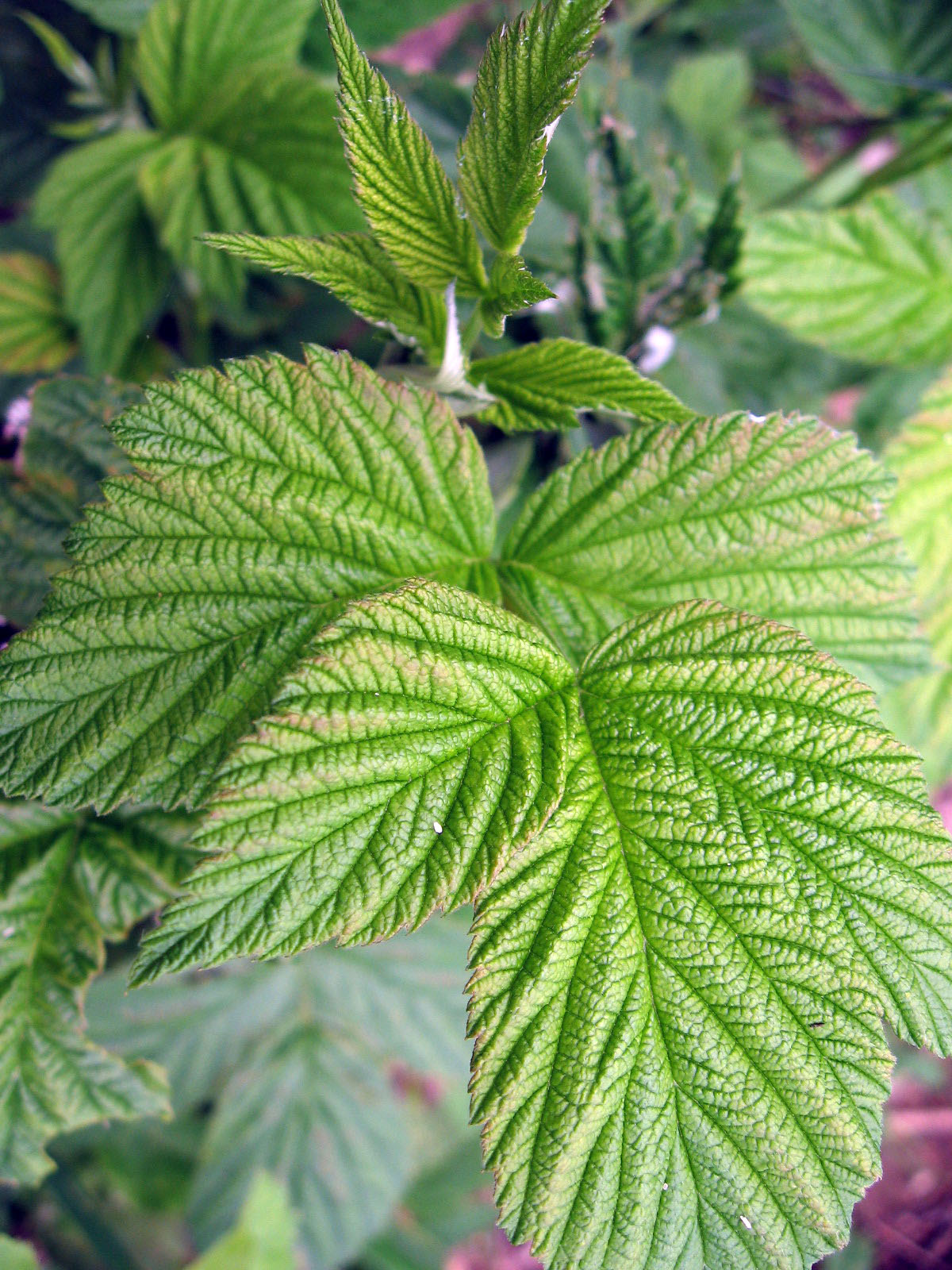 Metsvaarikas Lld: Rubus idaeus